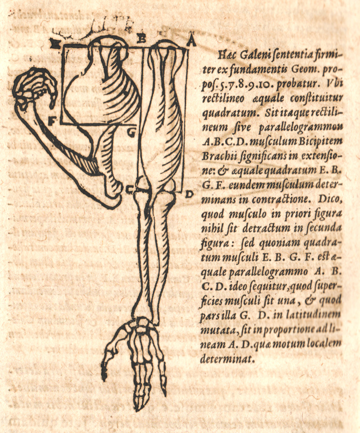 Abbildung einer Muskelkontraktion aus der Dissertation "De natura motus", Gießen 1617